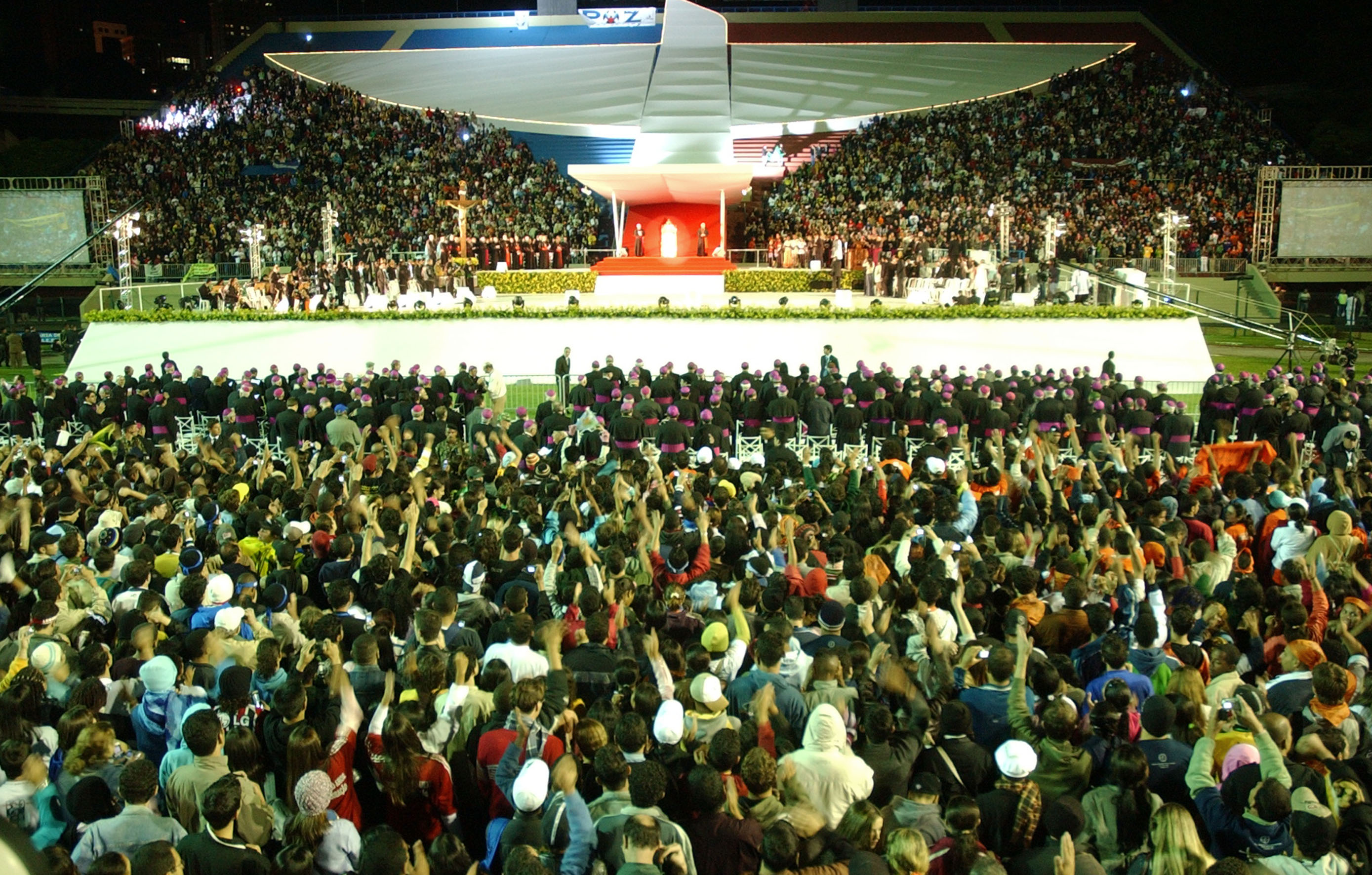 Bento XVI durante encontro com os jovens no Estádio do Pacaembu em São Paulo, Brasil.